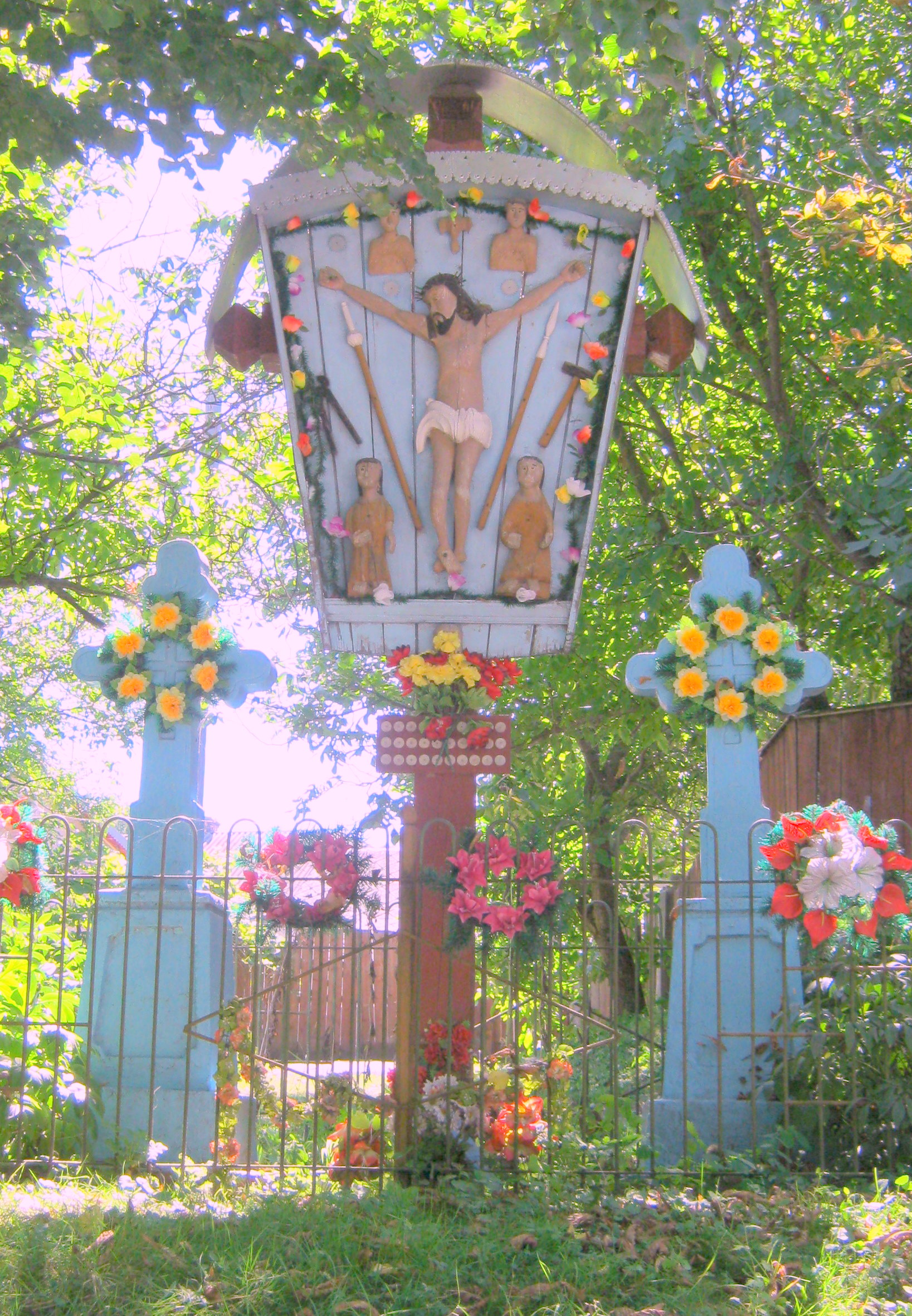 Старовинний хрест у селі Устя Борщівського району Тернопільської області